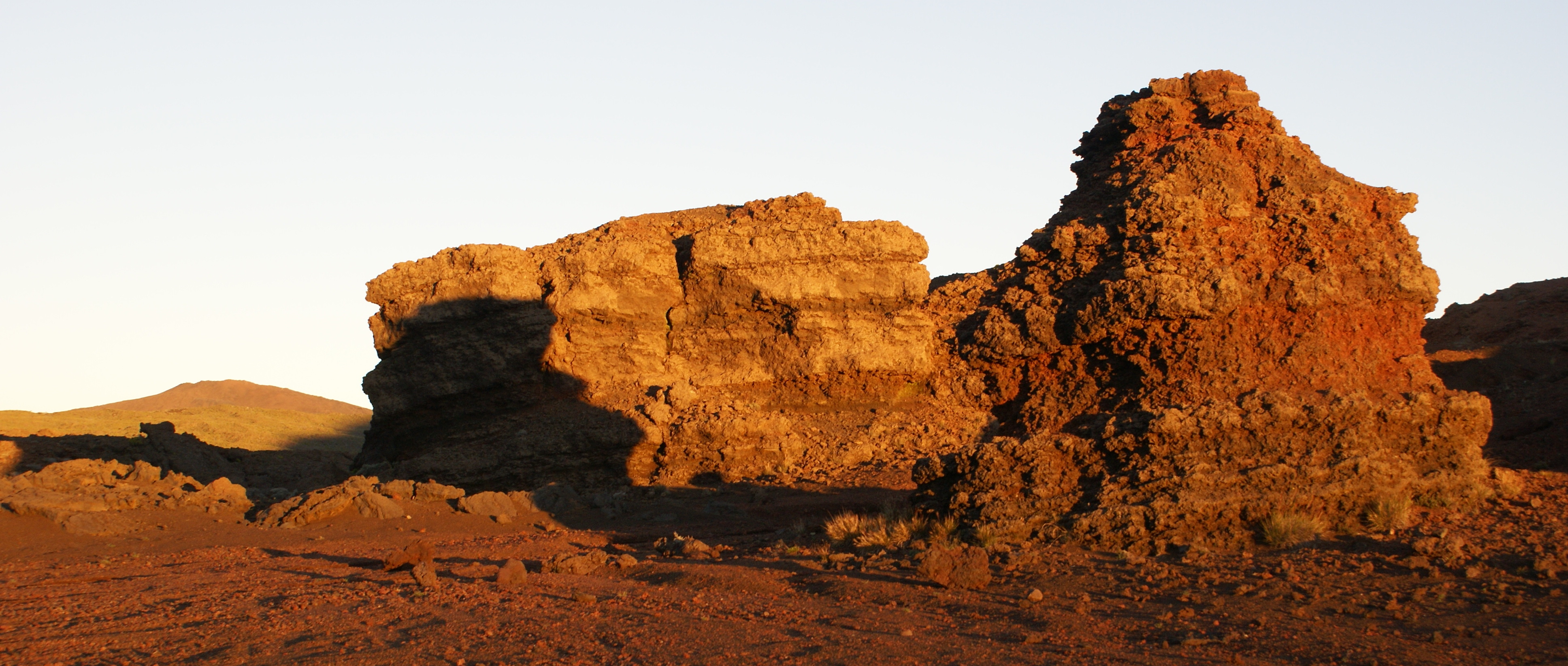 Les Gendarmes